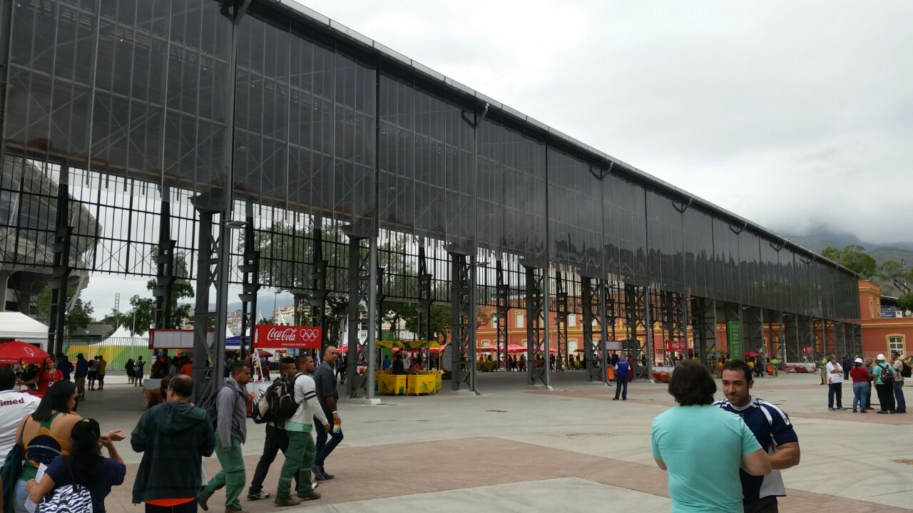 Estádio olimpico Nilton Santos